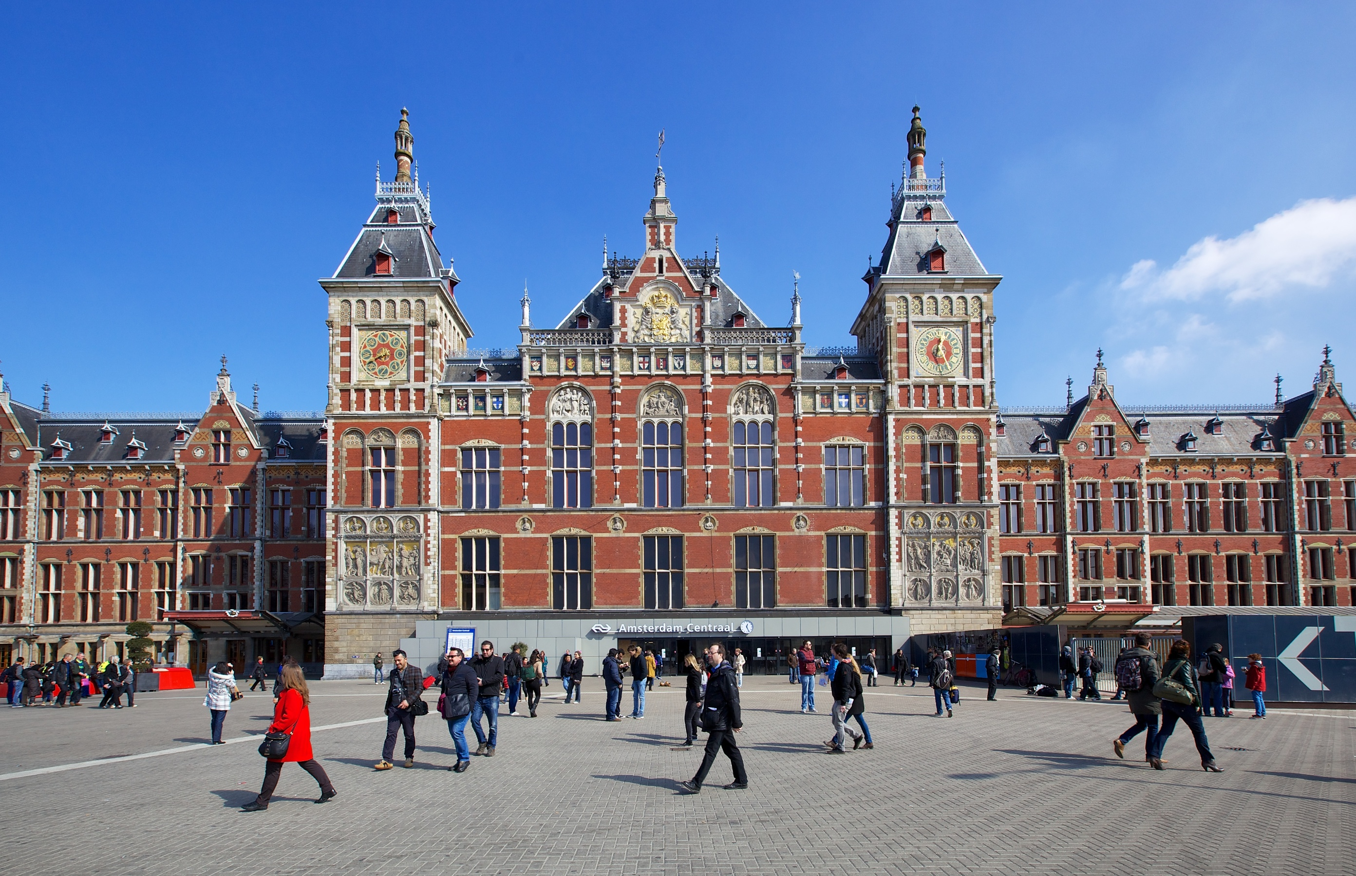 Centraal Train Terminal / Amsterdam, Holland